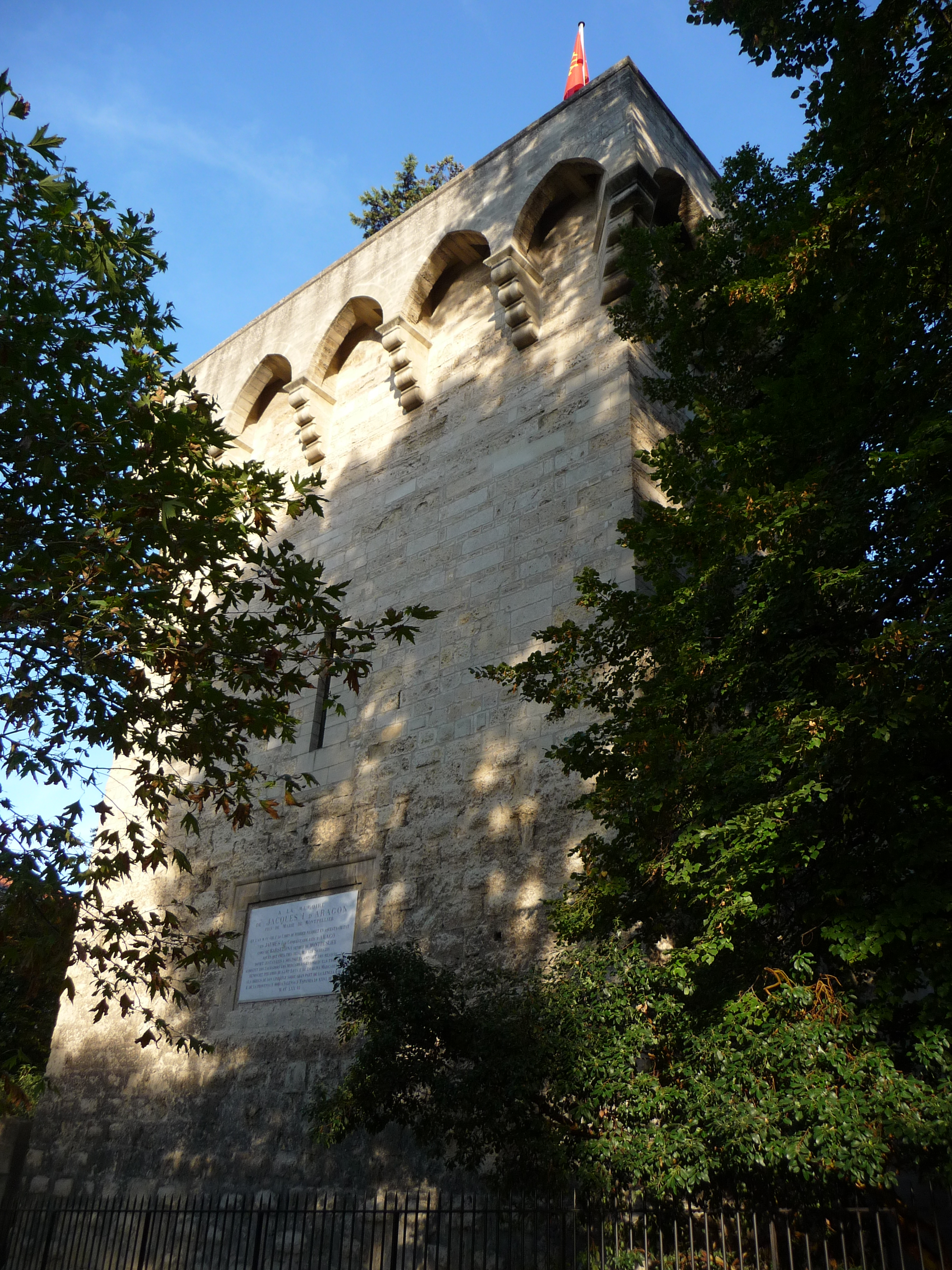 Torre dels Pins (Montpeller) .